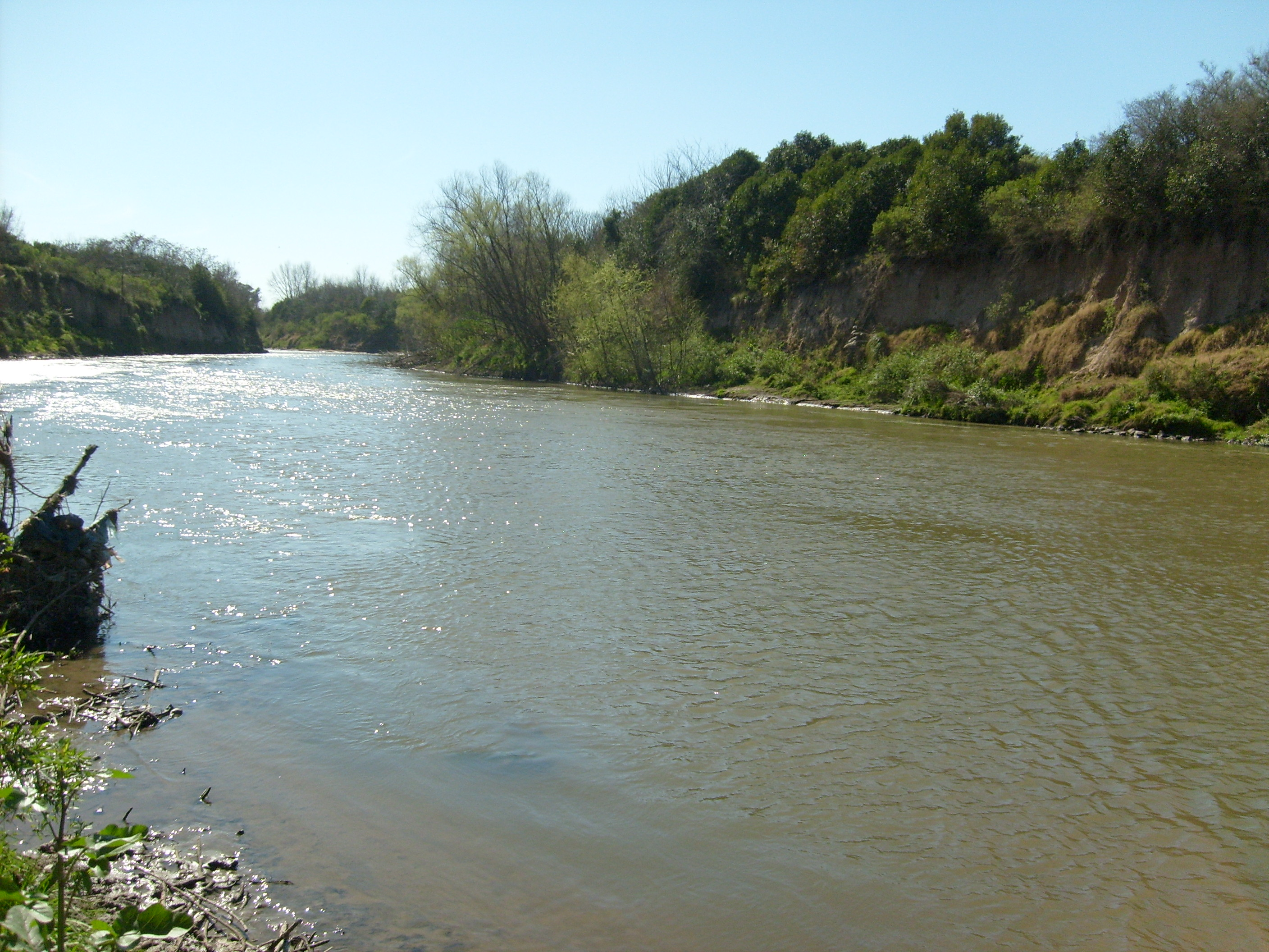 Río Carcarañá, desde Andino.